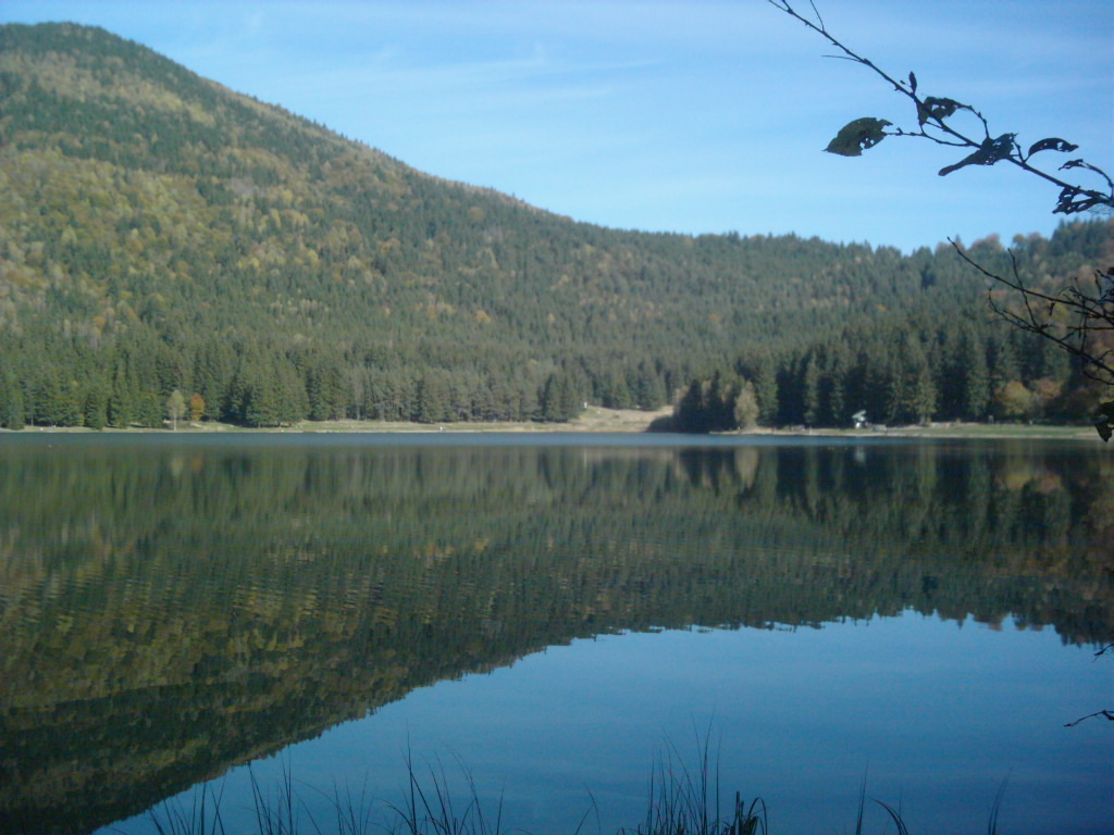 Szent Anna-tó